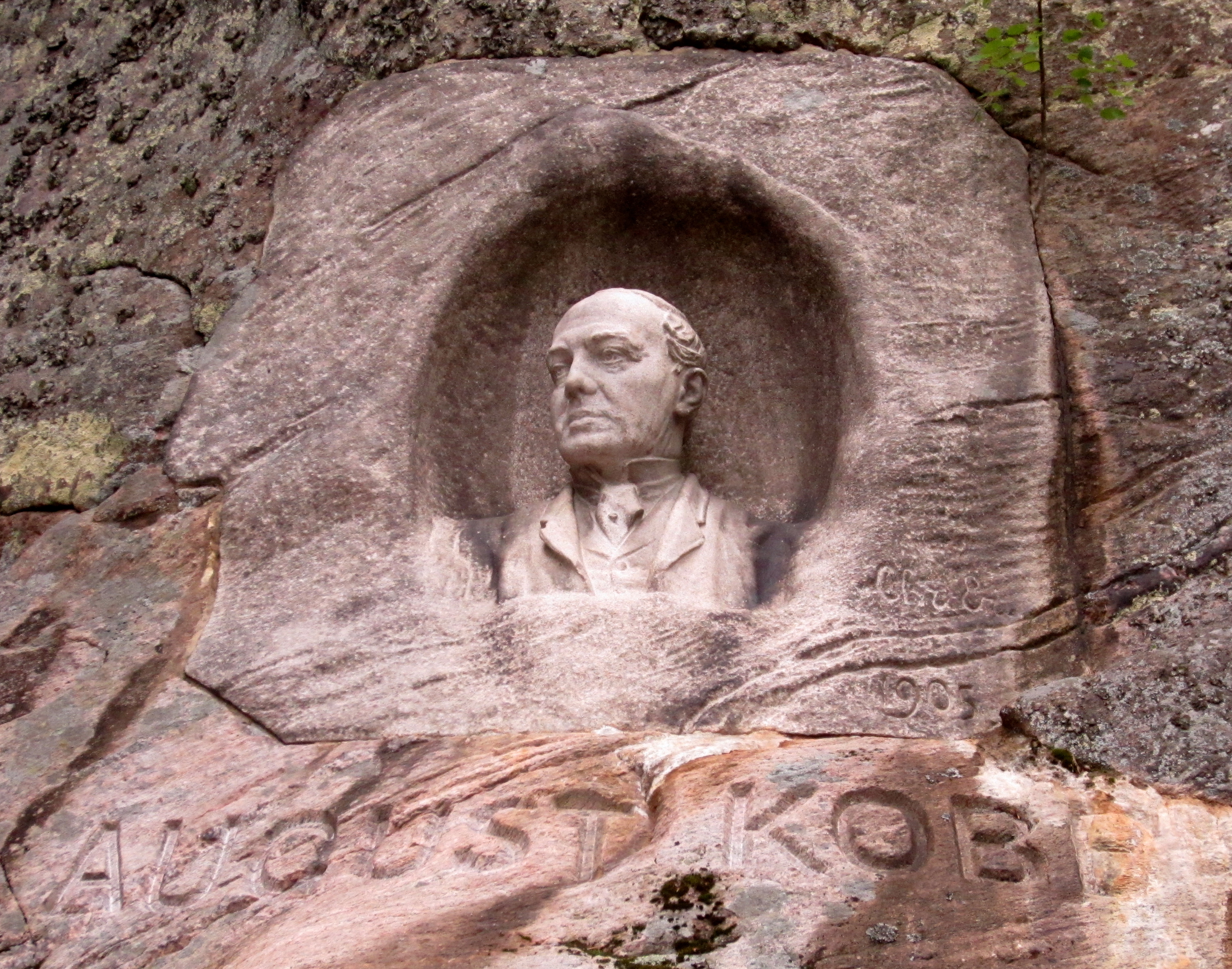 August Kobb av skulptören Christian Eriksson, byst i Slottskogen, Göteborg.